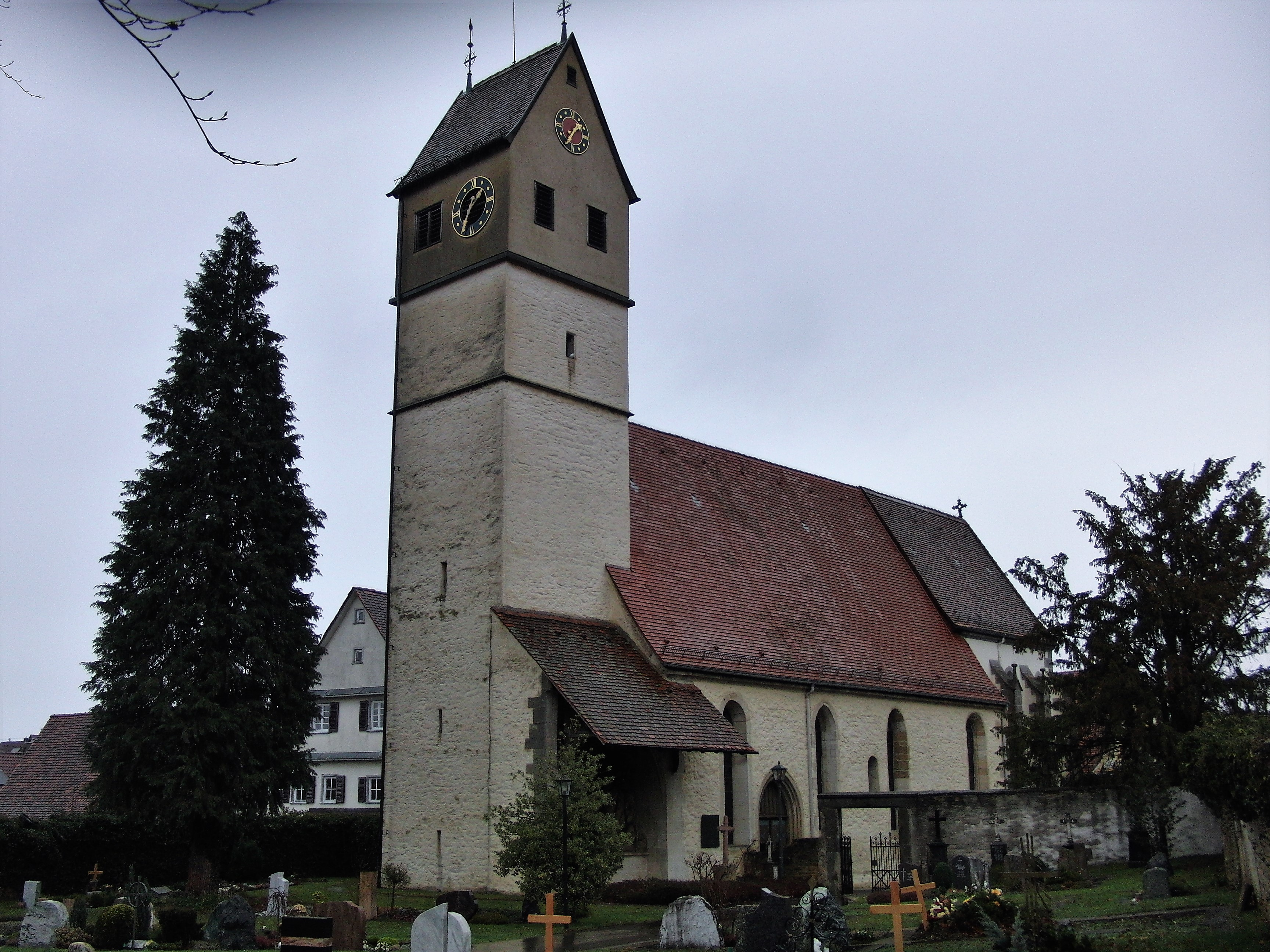 aus Blickrichtung Süden vom Friedhof aus